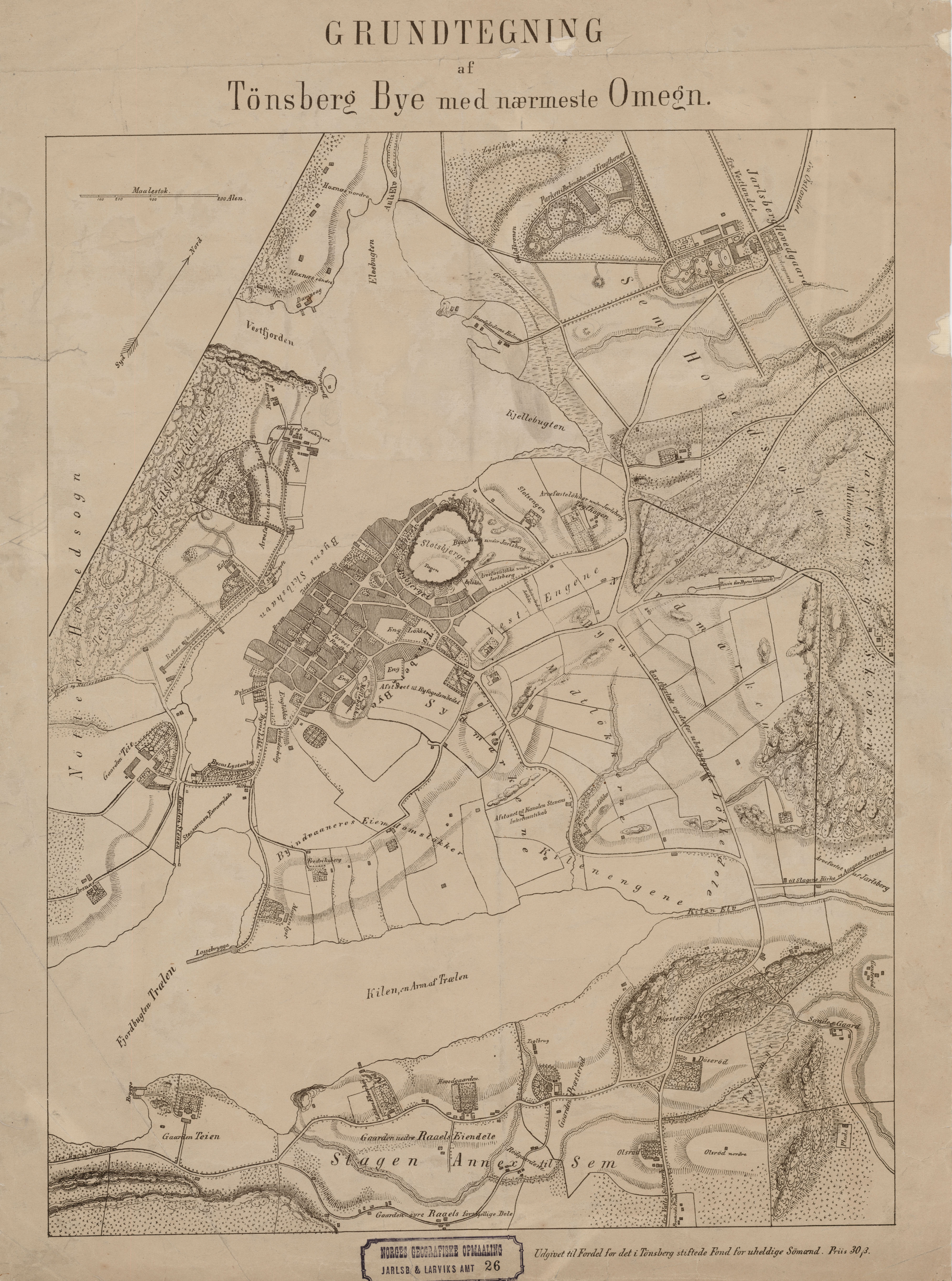 Kart over Tønsberg by 1865